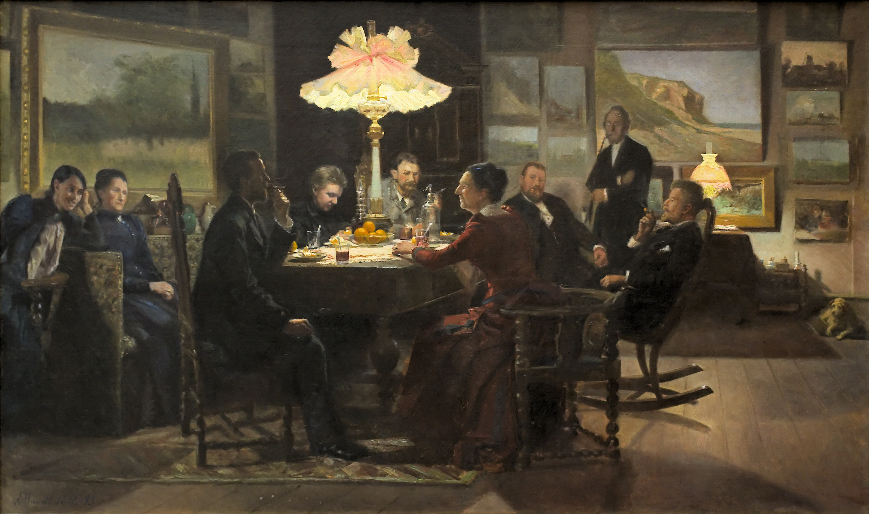 Portrætteret person: Fra venstre til højre: maleren og grafikeren Emma Meyer, maleren Louise Ravn-Hansen, linguist Vilhelm Thomsen med cigar, maleren Marie Luplau, maler Thorvald Niss, billedhugger Carl Aarsleff, pastor Daniel Luplau, maler Carl Thomsen og Karen Charlotte Thomsen - gift med Vilhelm Thomsen.